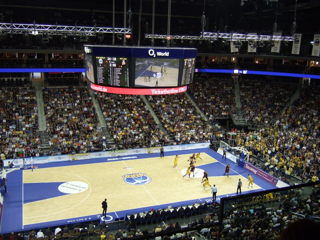 Erstes Heimspiel von ALBA in der neuen o2world gegen Artland Dragons